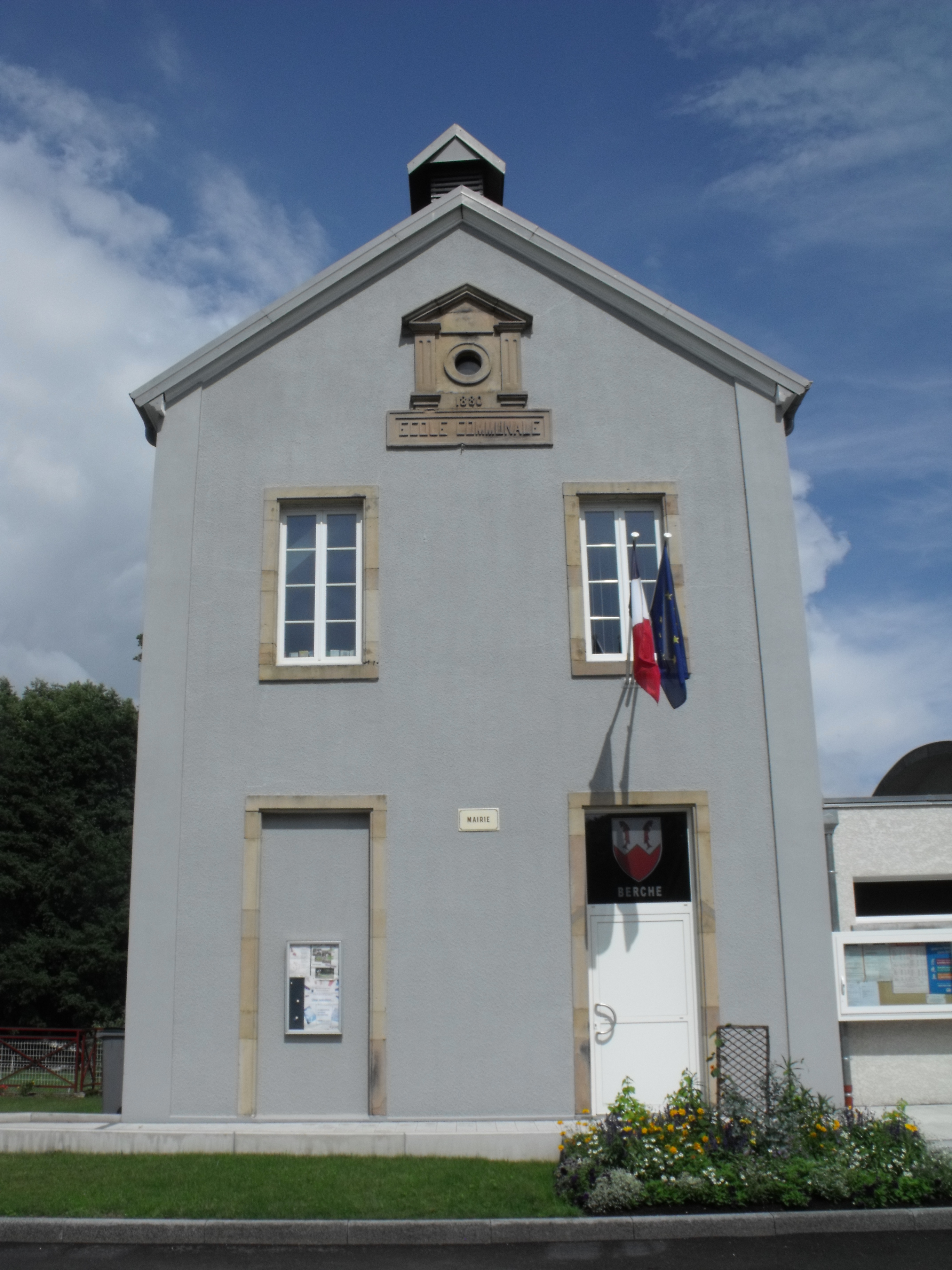 Mairie de Berche, Doubs, France